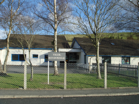 Ysgol Rhydypennau, Pen-y-garn